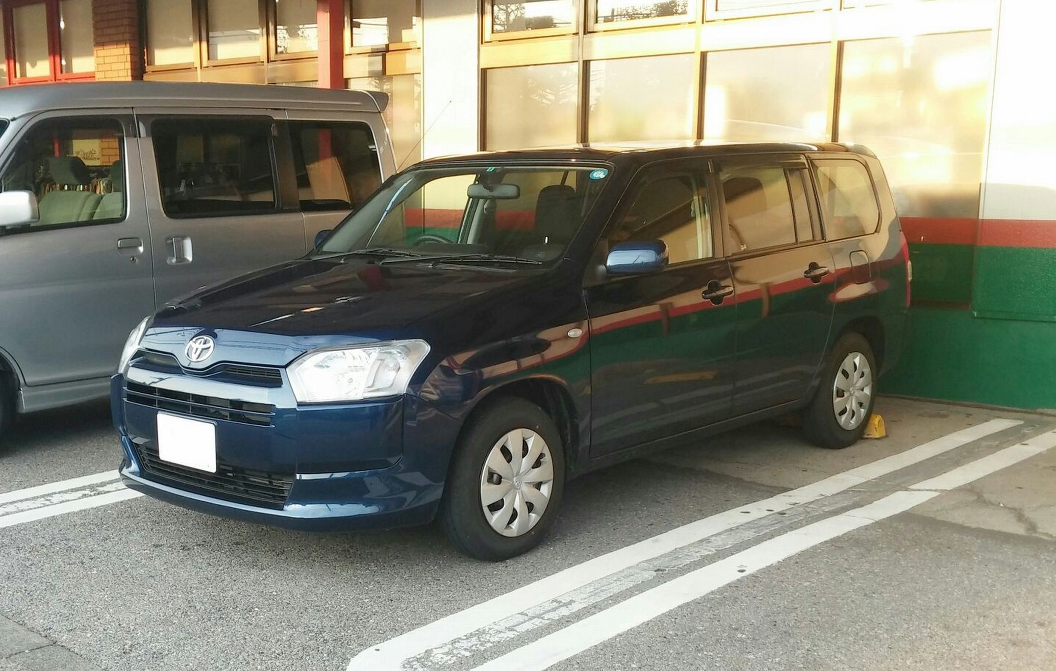 トヨタ・サクシード